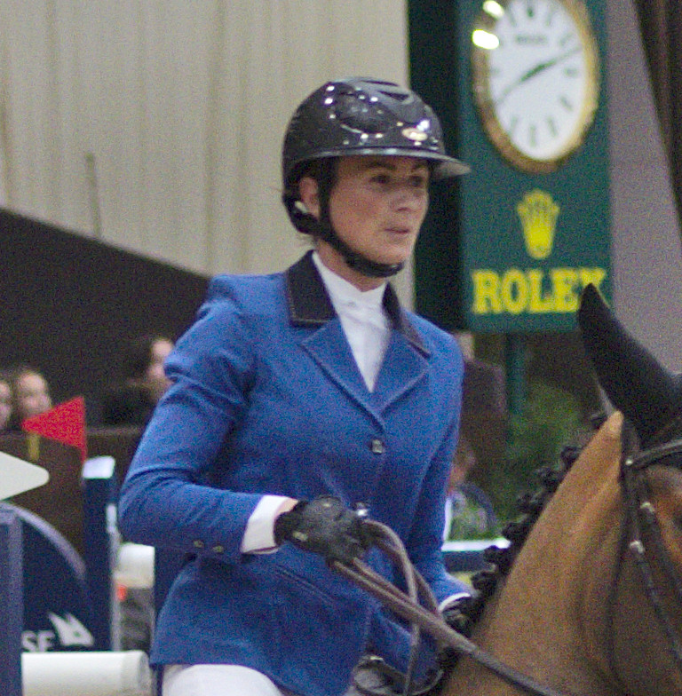 Pénélope Leprévost au CHI de Genève 2013